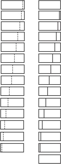 sematski prikaz novcanica